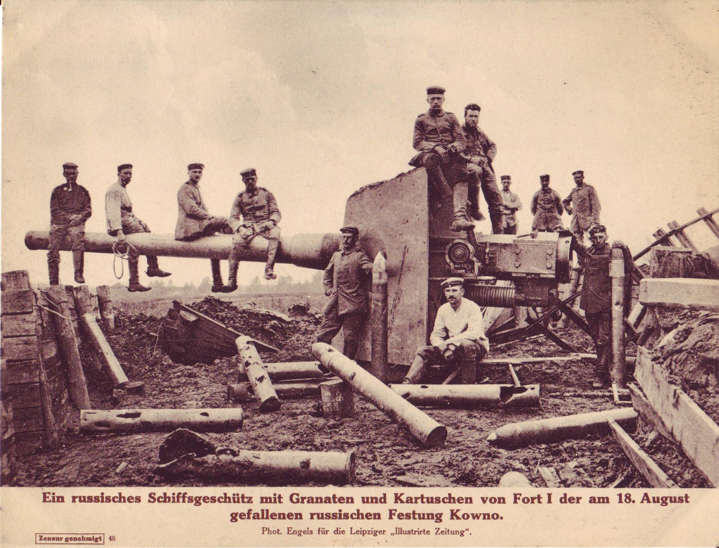 Postkarte